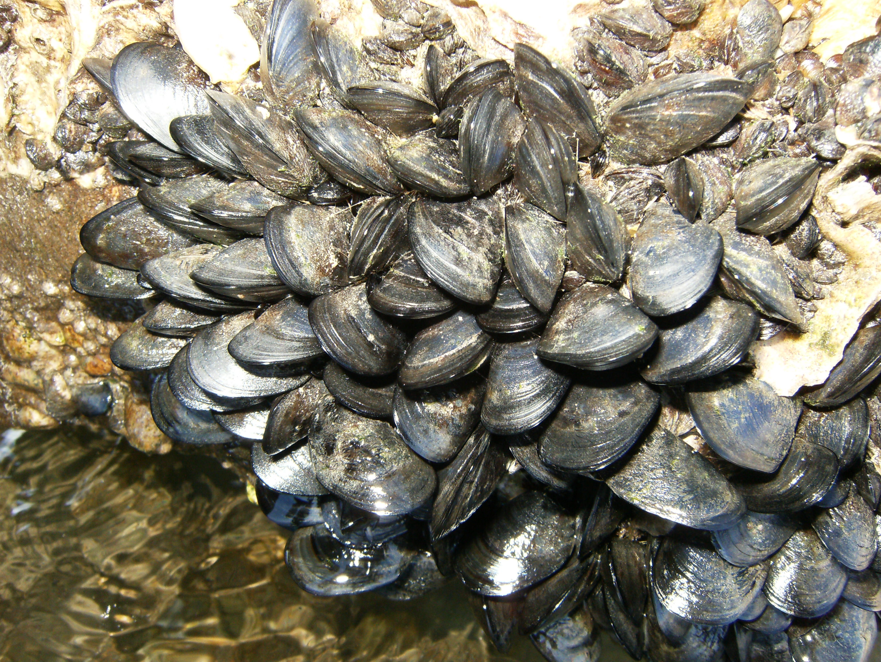 Miesmuscheln bei Ebbe, Lido di Jesolo, Veneto, Italien.